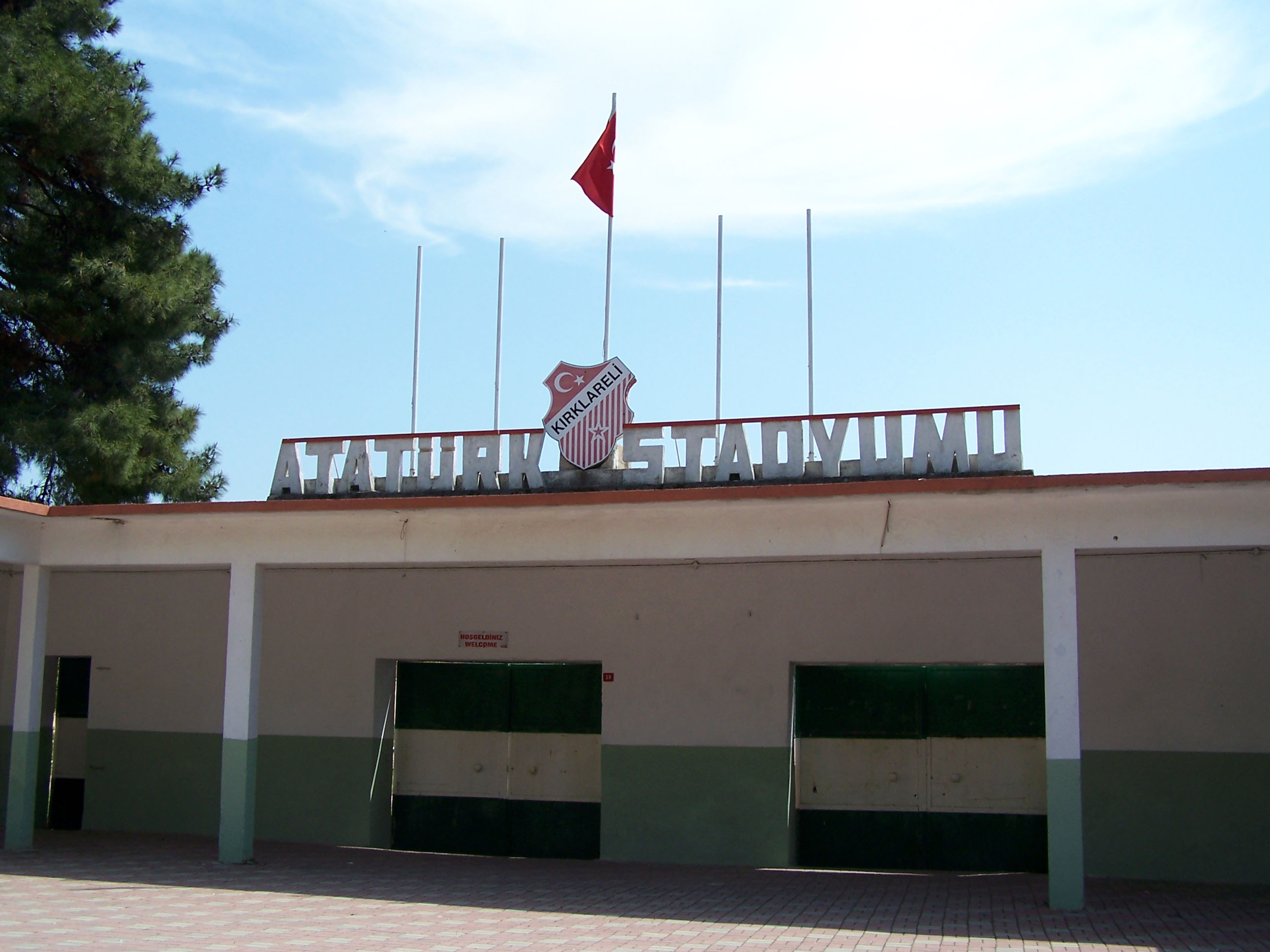 Atatürk Stadyumu in Kırklareli, Turkey